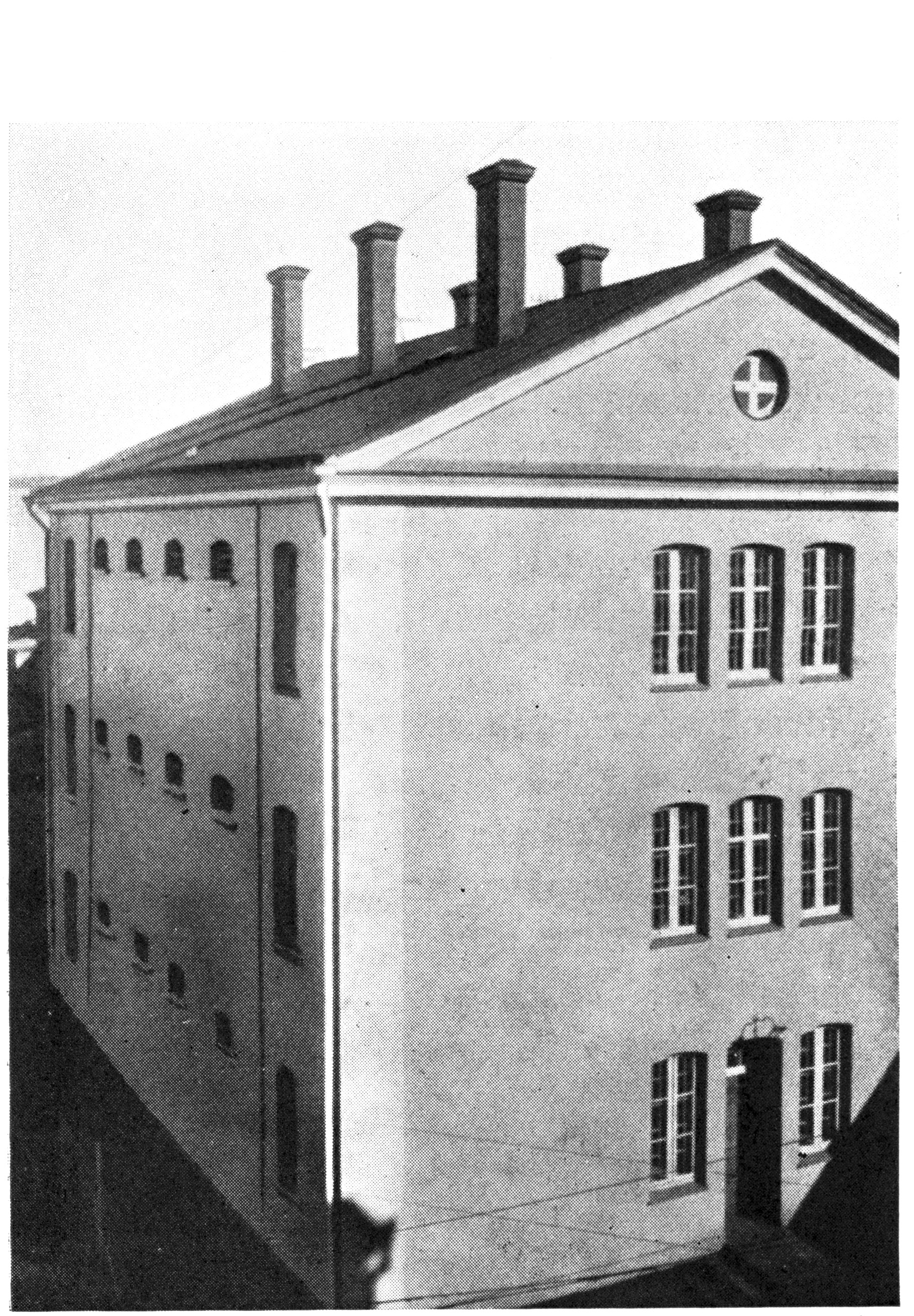 Kronohäktet i Karlshamn